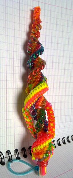 scoubidous de 16 fils posés sur un cahier à réglures Seyès